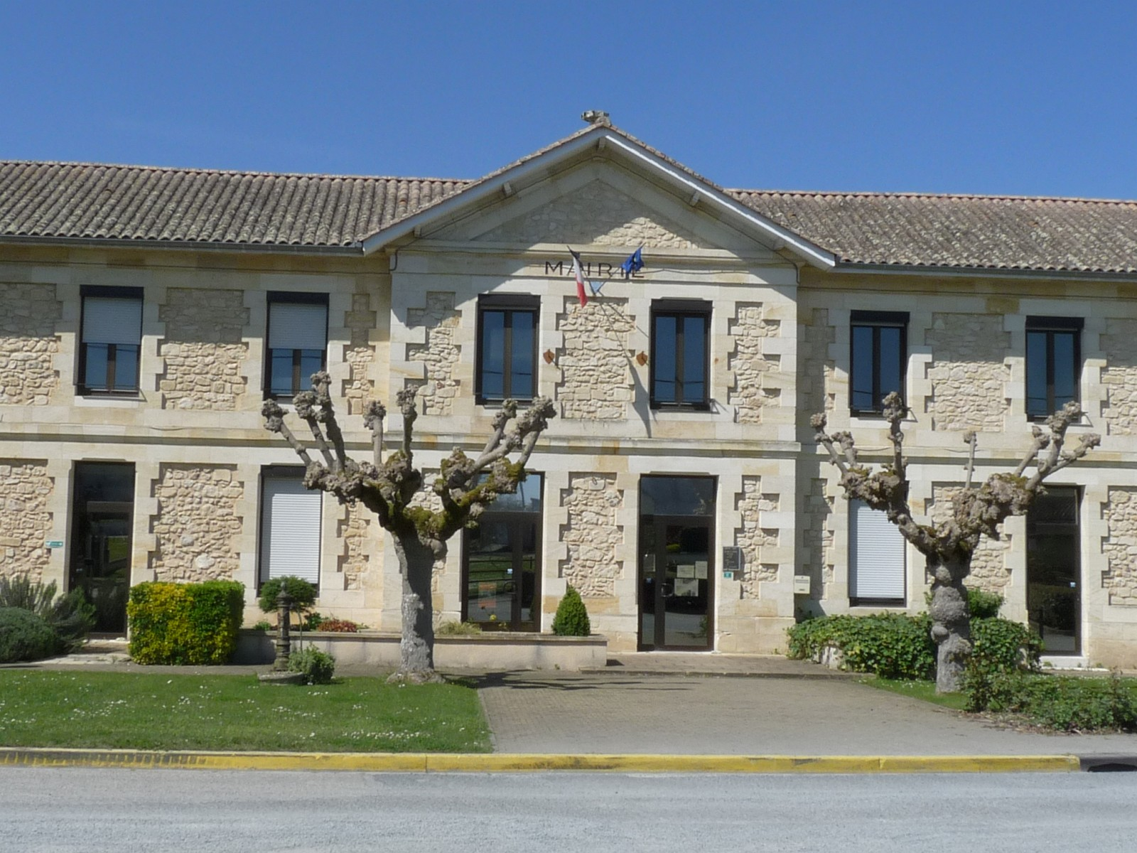 Mairie des Peintures, Gironde, France